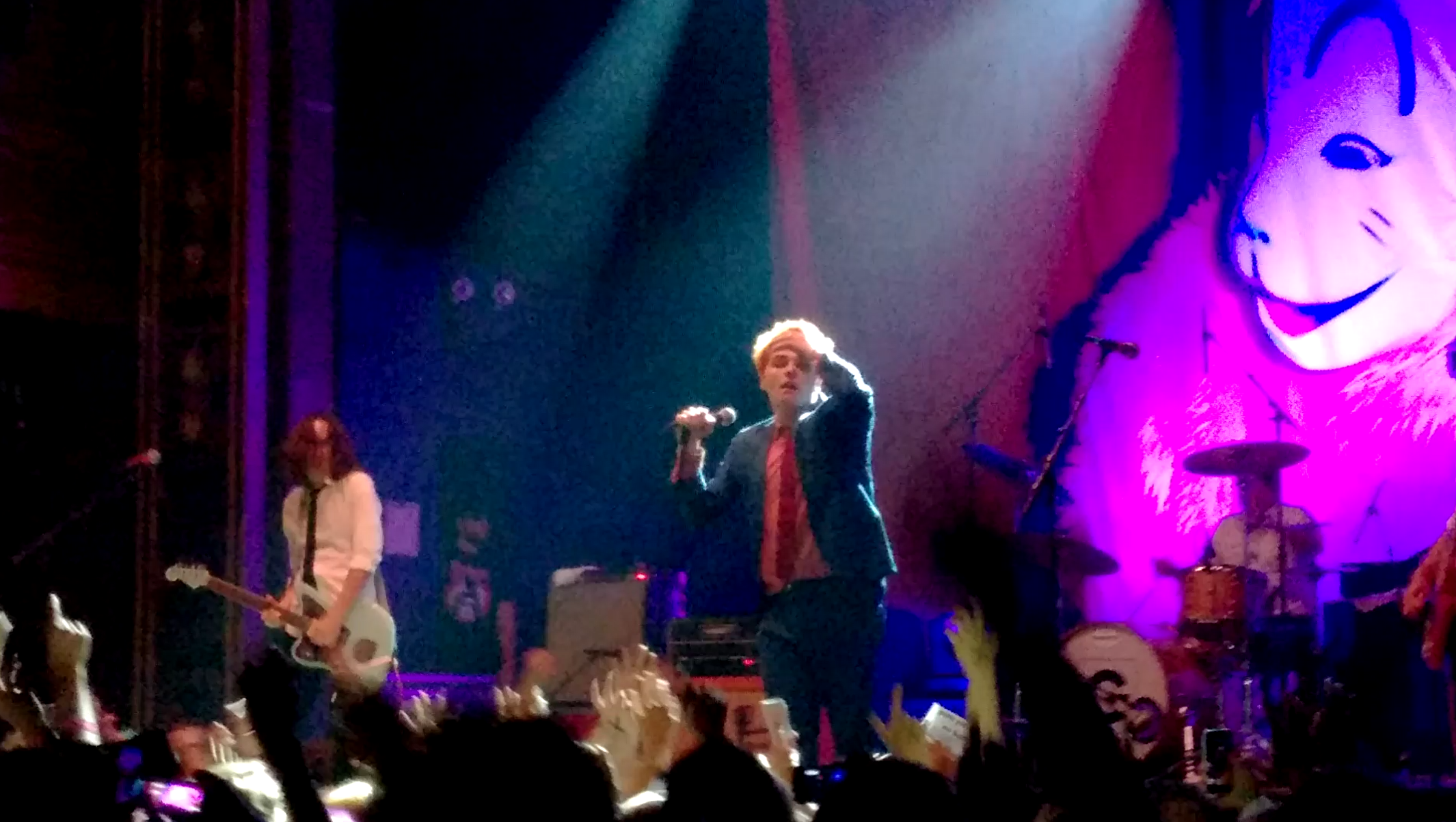 Gerard Way en su concierto en el Webster Hall de Nueva York (Estados Unidos).